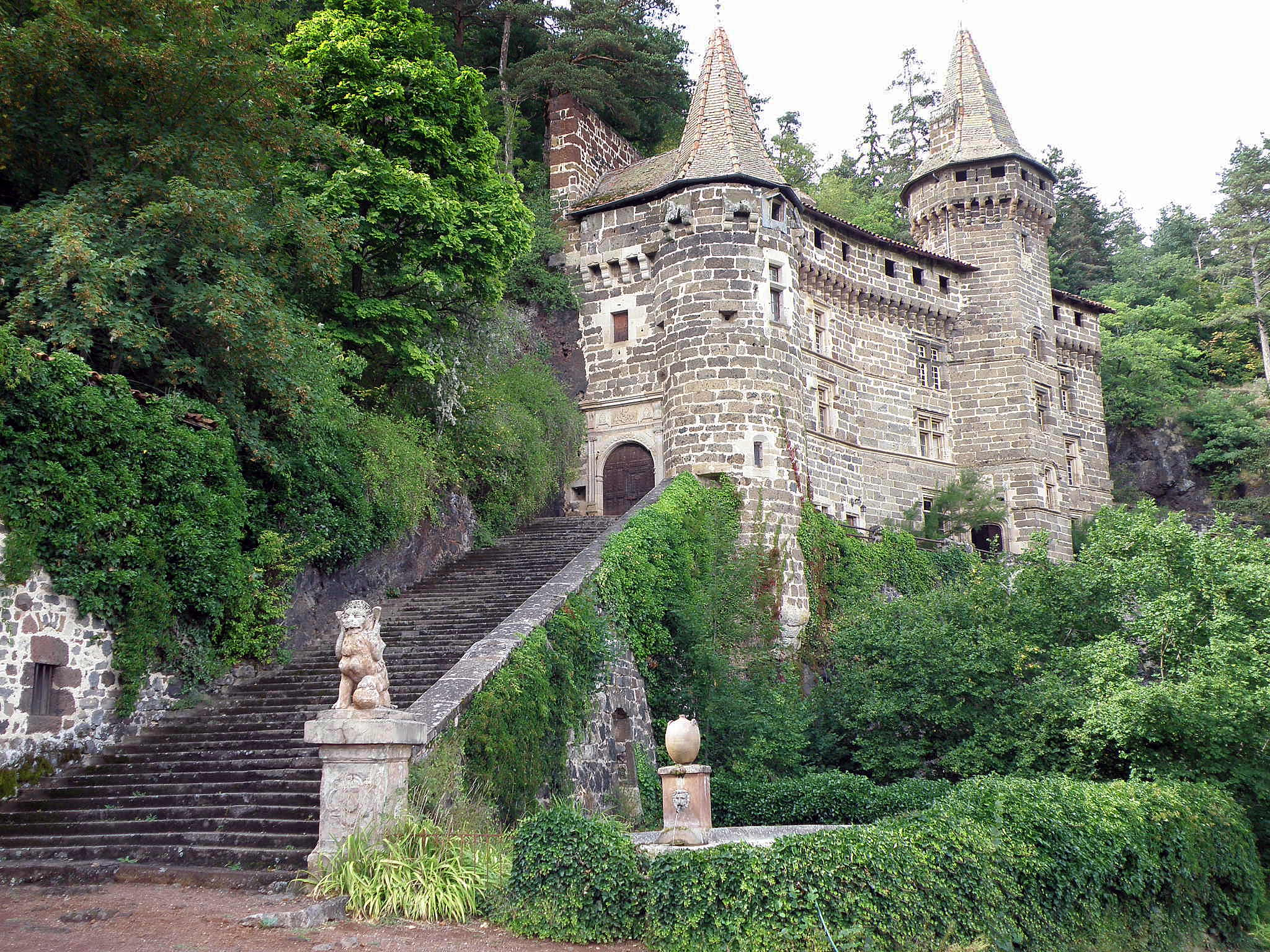 Saint-Paulien, dép. de la Haute-Loire, France (Auvergne). Château de La Rochelambert.